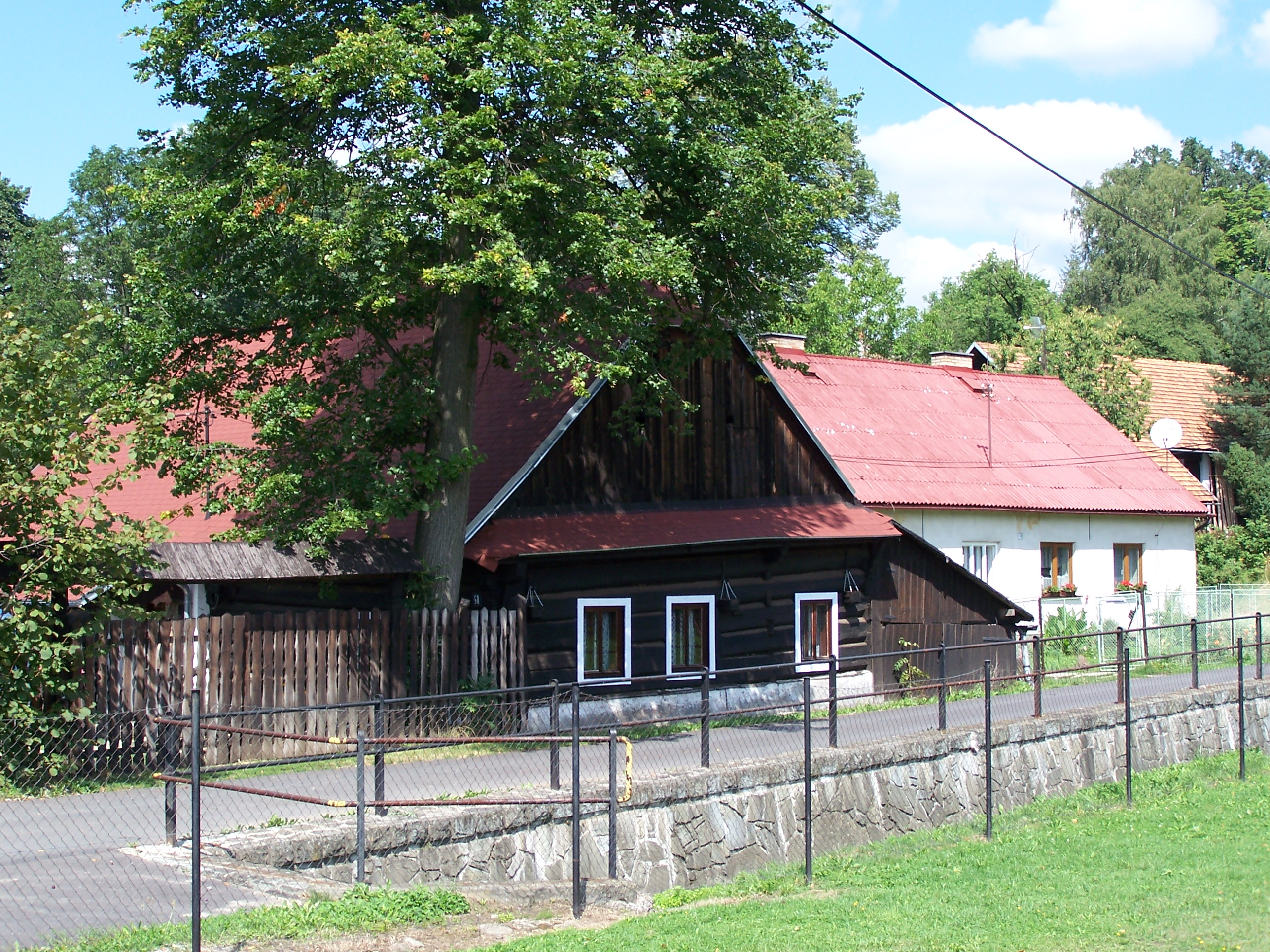 Old wooden house (drzewiónka) in Písek (Piosek), Czech Republic.